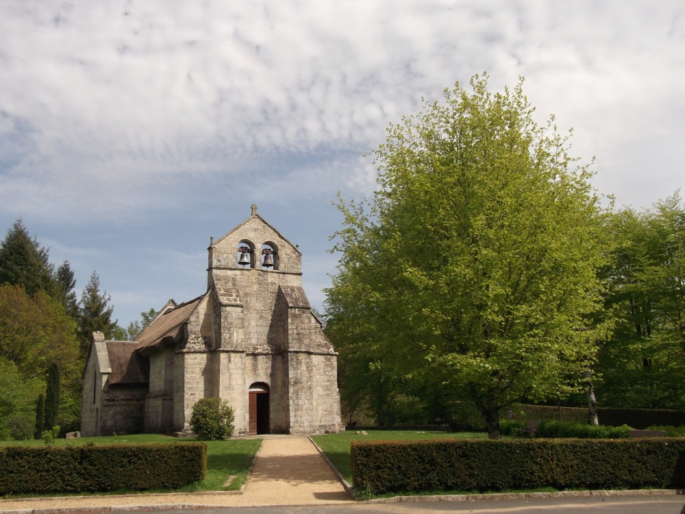 Eglise Saint-Martial du XIIème siècle au toit en chaume. .